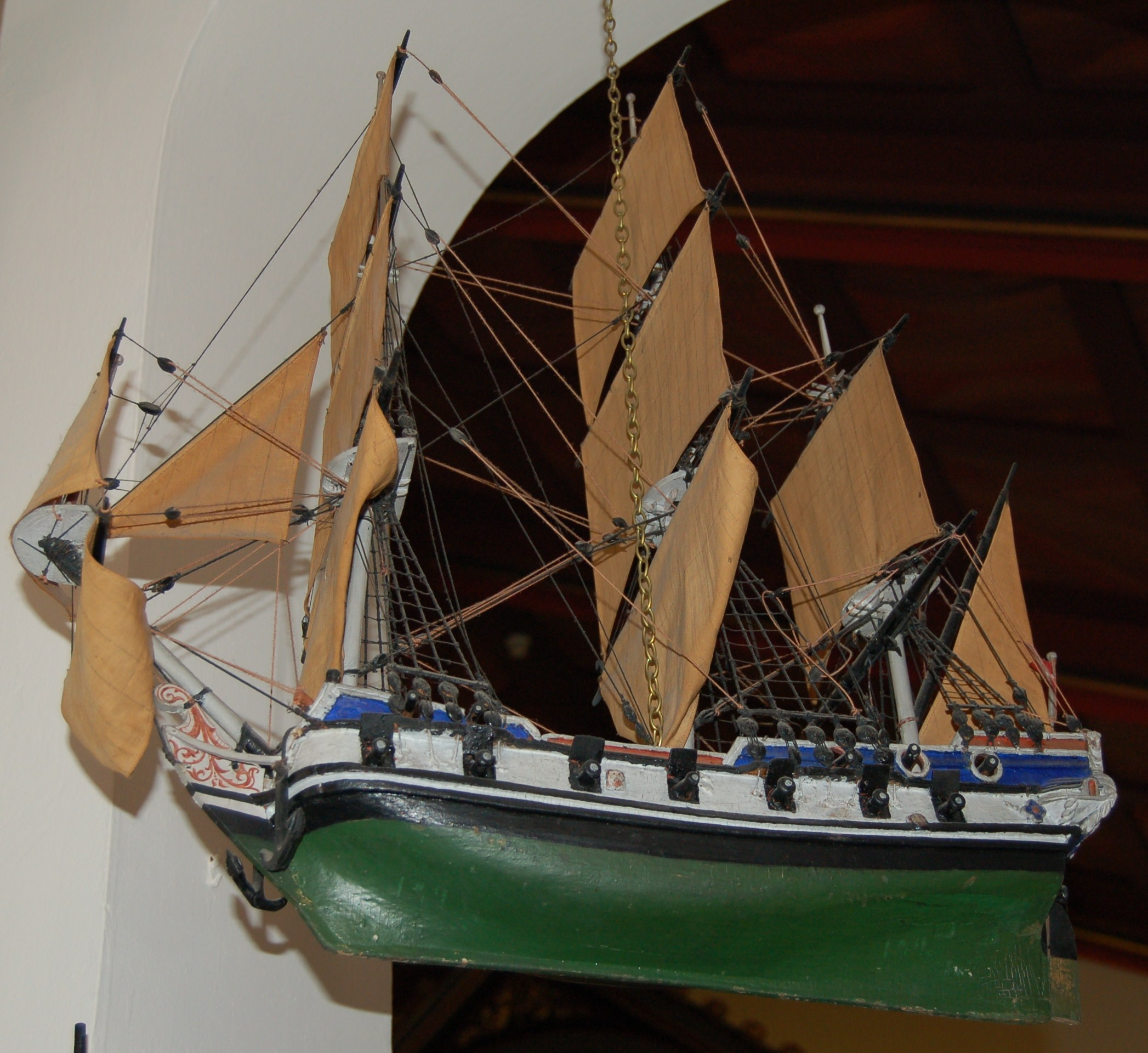 Skipsmodell i Larvik kirke